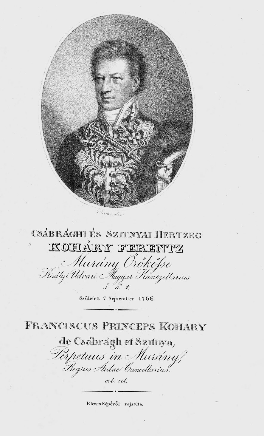 Herceg csábrági és szitnyai Koháry Ferenc József (Bécs, 1767. szeptember 4. – Oroszvár, 1826. június 27.), királyi kamarás, titkos tanácsos, aranygyapjas vitéz, főpohárnok, főkancellár, Hont vármegye örökös főispánja.